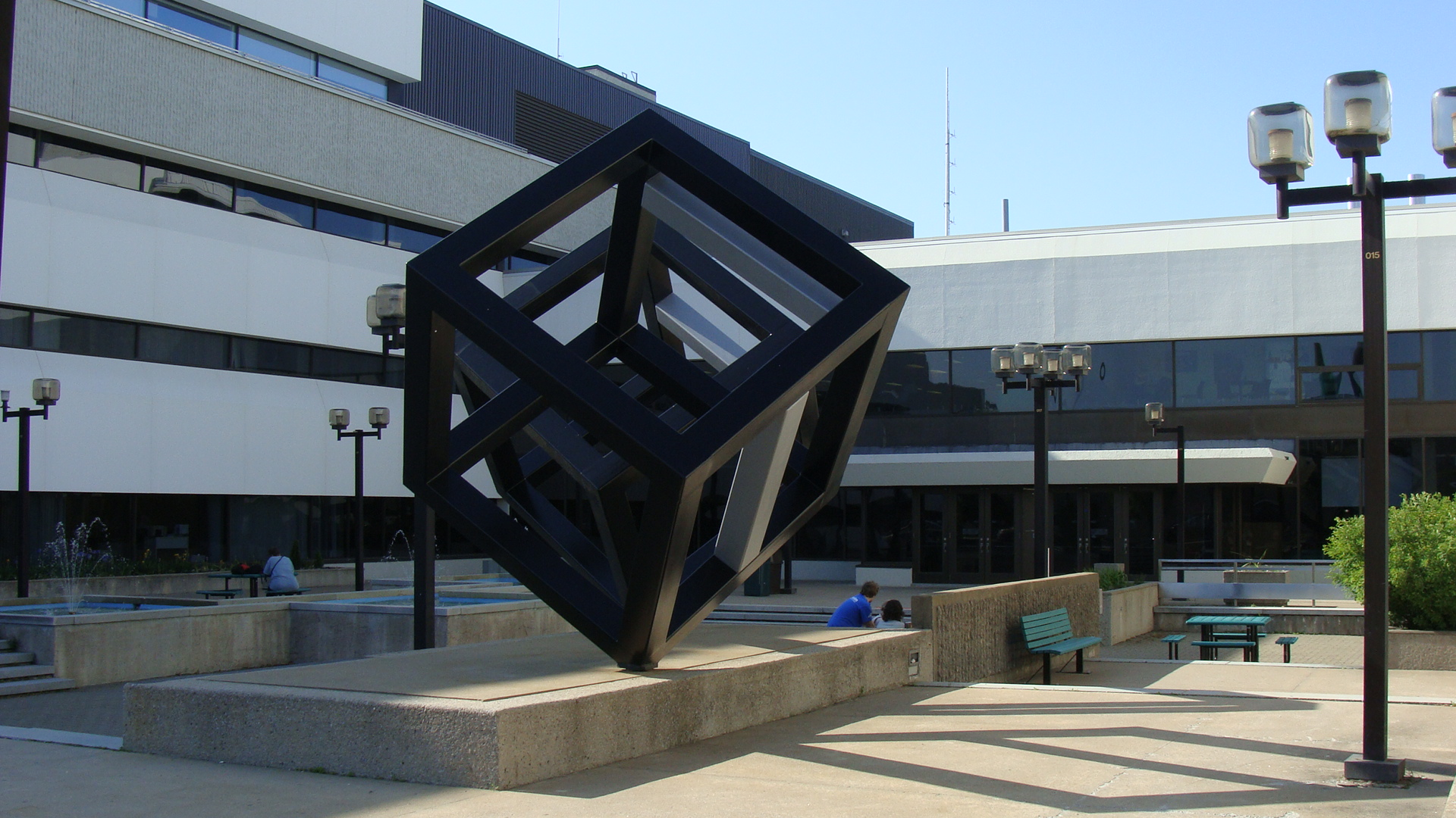 Entrées des pavillons Albert Tessier et Léon Provancher de l'Université du Québec à Trois-Rivières, au Québec (Canada).